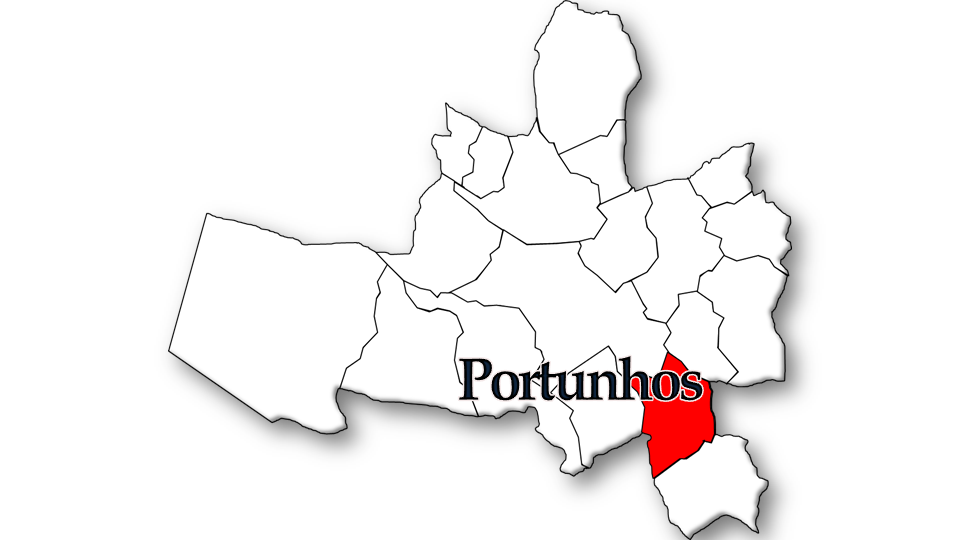 População